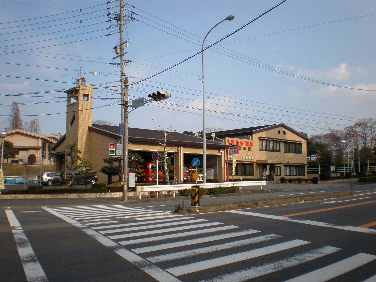 愛知県小牧市消防本部東支署